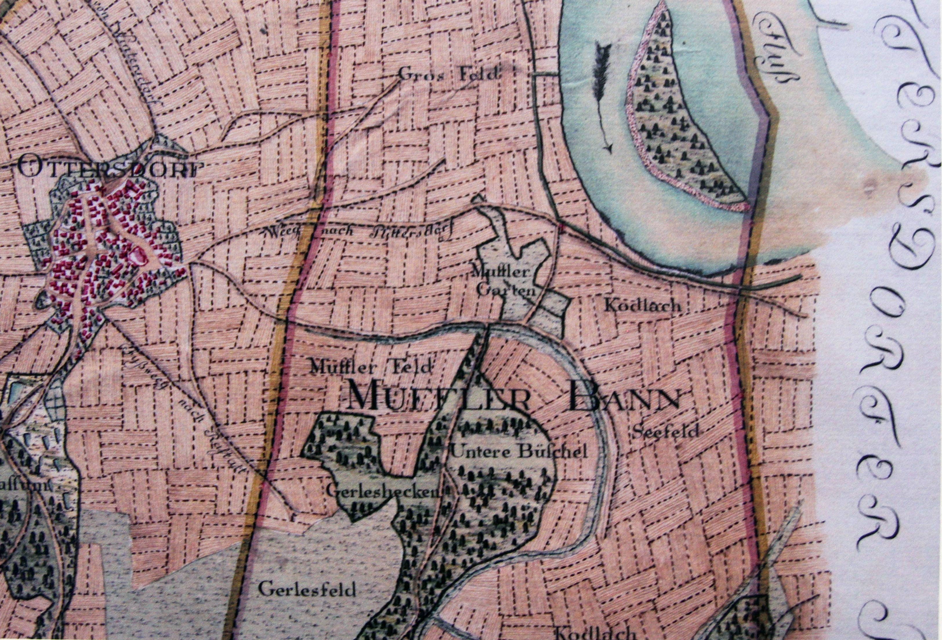 Das Foto ist ein Auszug einer Karte aus dem Jahre 1785, das die Lage der Muffenheimer Gemarkung zeigt. Die Originalkarte befindet sich im Generallandesarchiv in Karlsruhe (GLA H Ottersdorf Nr.2).